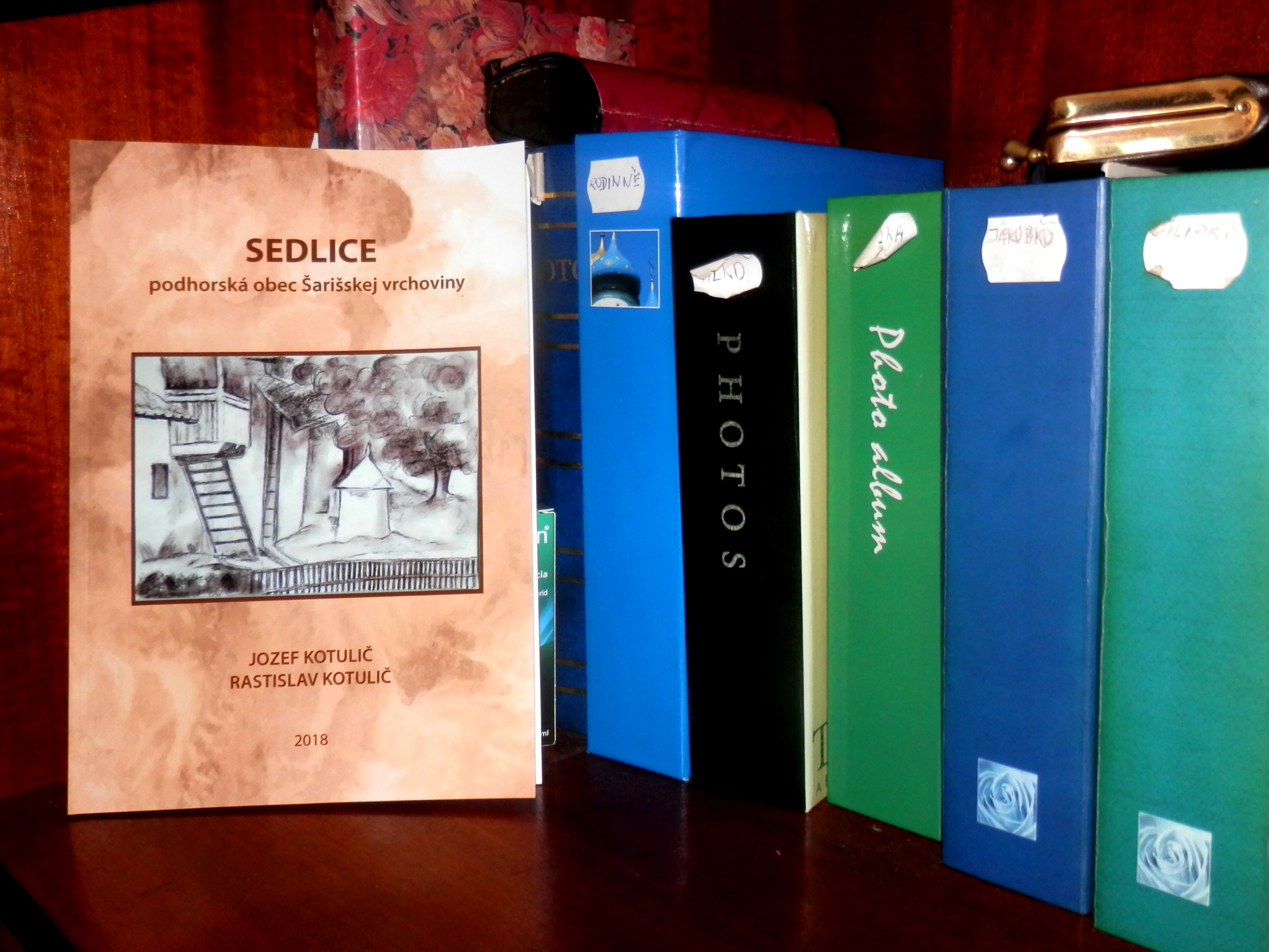 Publikácia: Sedlice podhorská obec Šarišskej vrchoviny, 2. vydanie. Rok 2018. Slovensko.